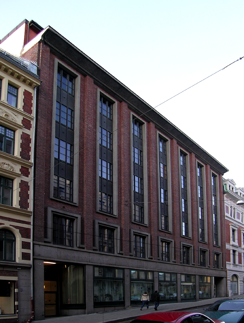 Former Astoria hotell, Akersgata 21, Oslo. Built 1930. Architects: Carl Michalsen and Eystein Michalsen.